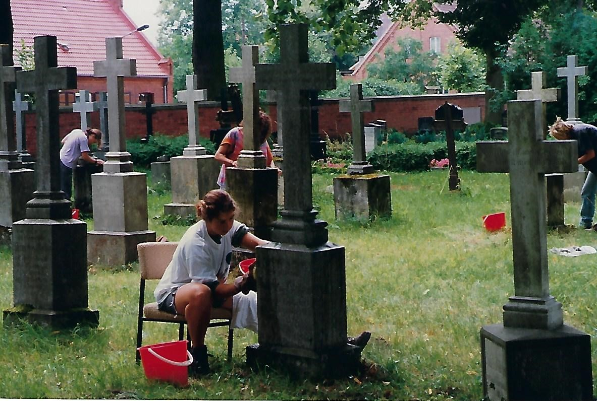 Studenten des Service Civil International bei der Reinigung von Grabsteinen im Kloster Dobbertin.